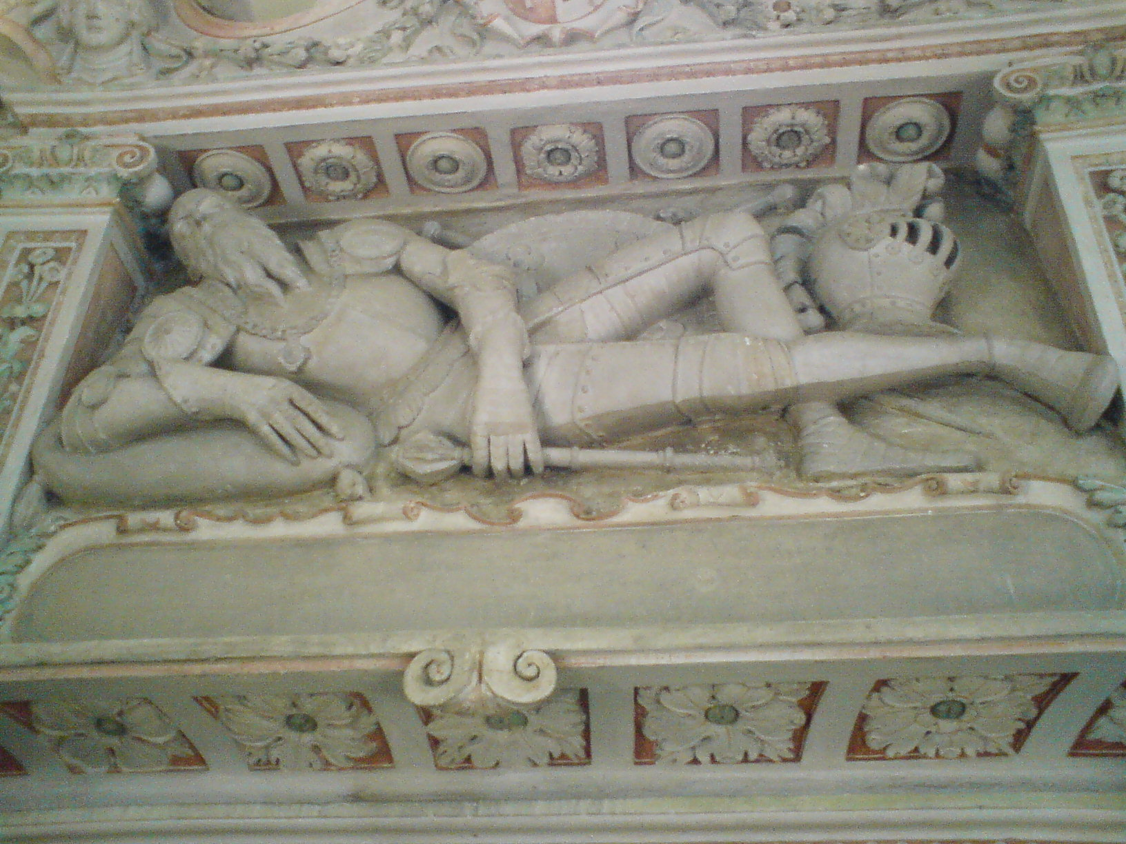 Uchanie, kościół par. p.w. Wniebowzięcia NMP, XV, 1 ćw. XVII